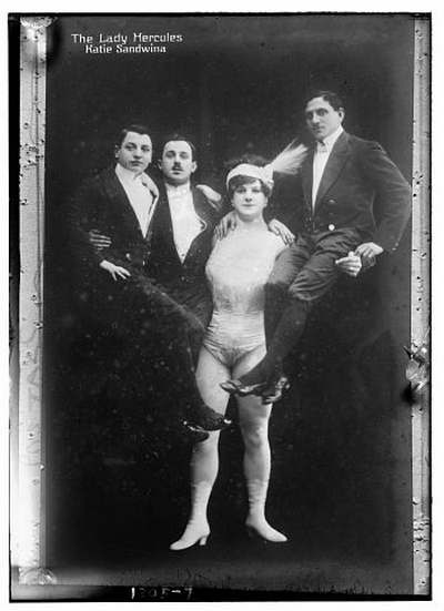 sandwina levantando a su esposo y a el alcalde